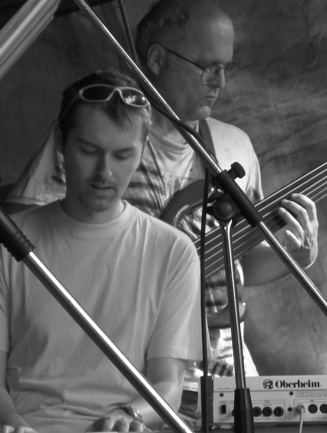 Val u Dobrušky 2006